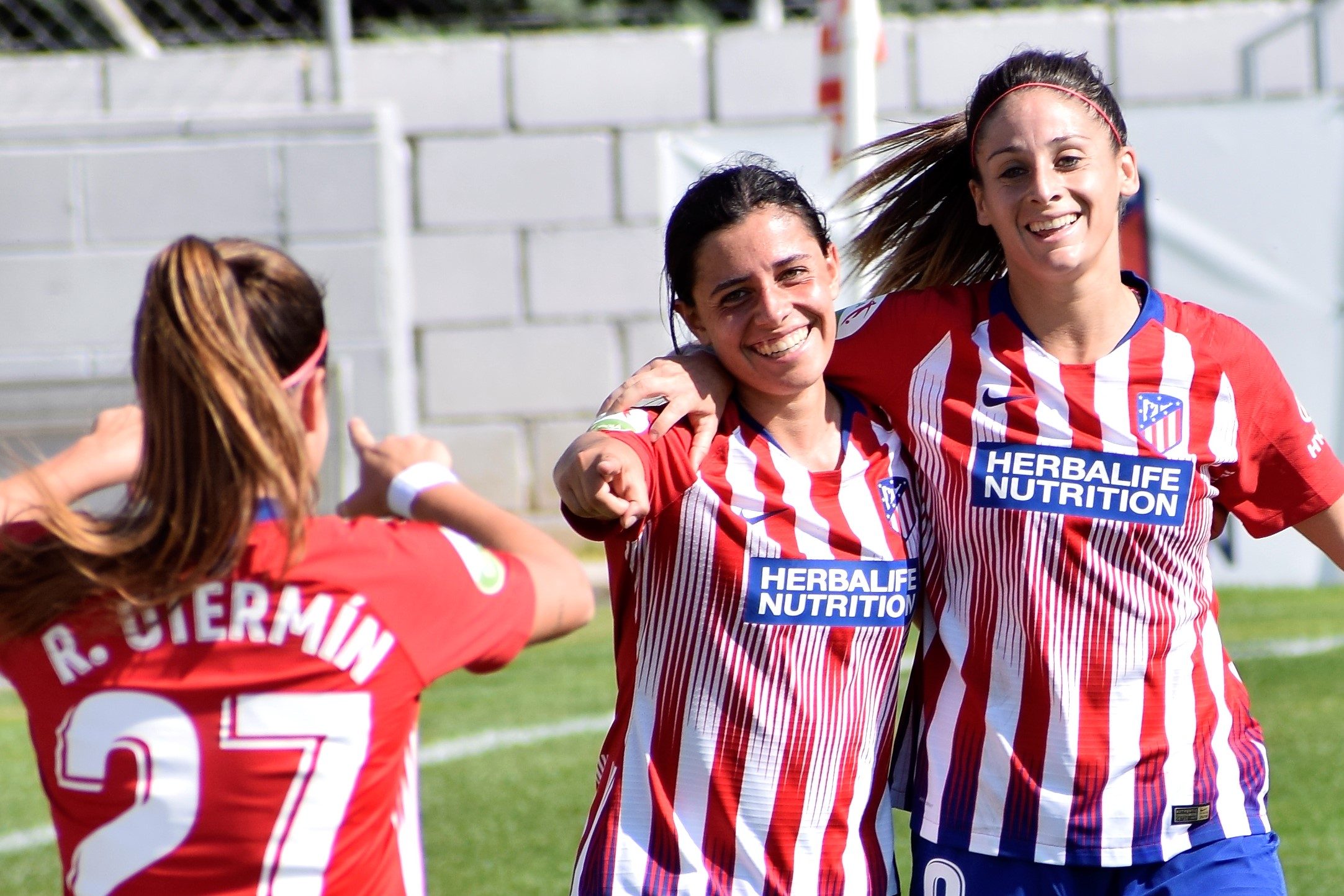 Alex Chidiac y Esther Gonzalez celebrando un gol con el Atlético de Madrid